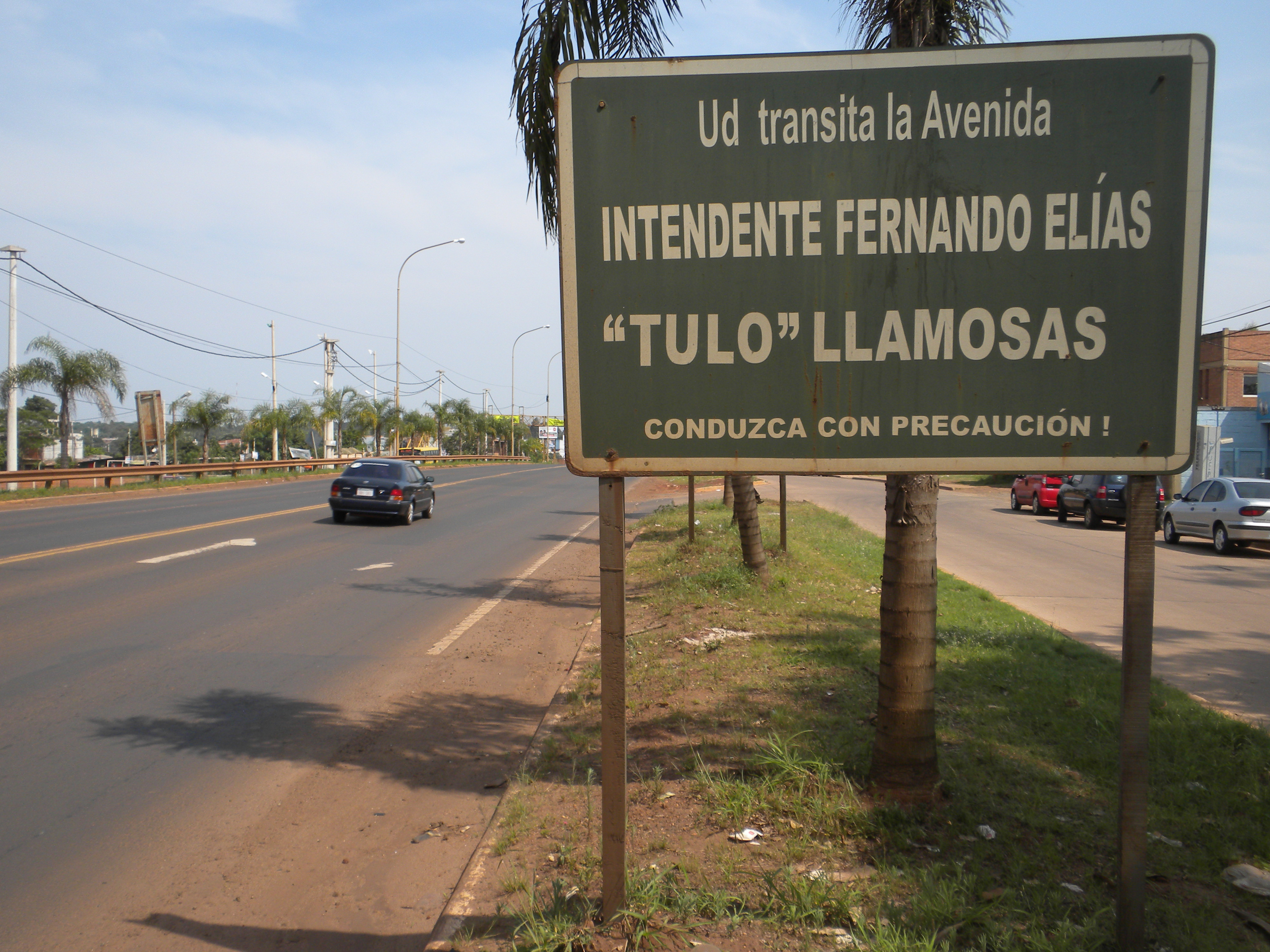 Cartel Posadas (Provincia de Misiones, Argentina) - Avenida Intendente Fernando_Elías "Tulo" Llamosas (Ruta Nacional 12). Fuenteː Periodista Horacio Cambeiro.